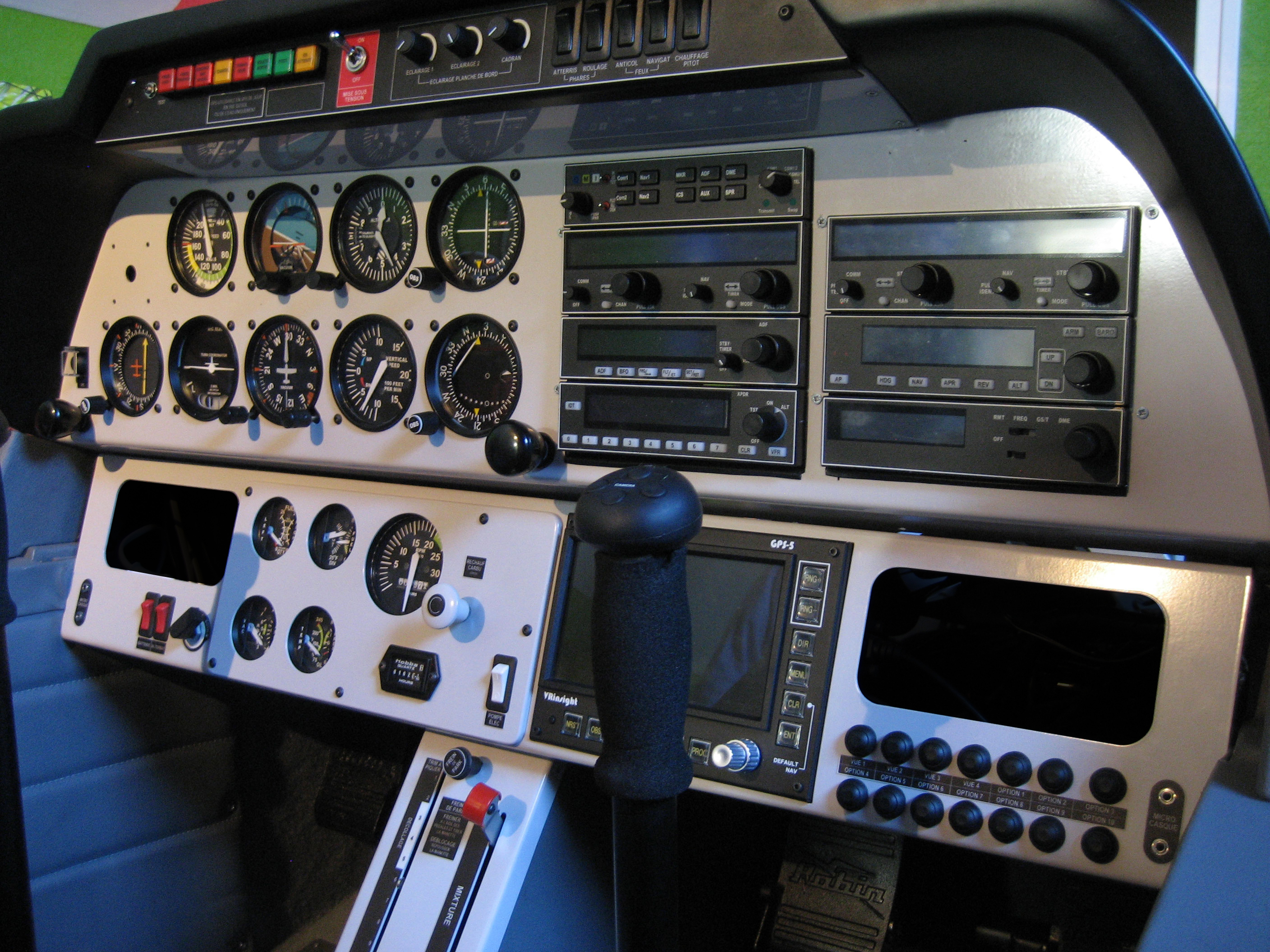 Le cockpit d'un simulateur de vol SEV PRO 6.